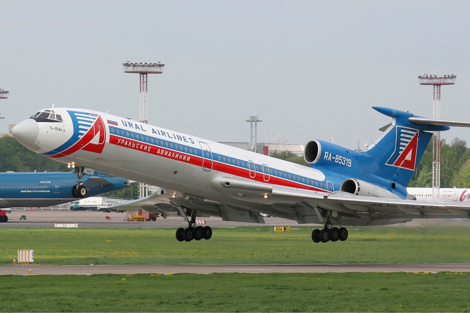 Ural Airlines Tupolev Tu-154B-2